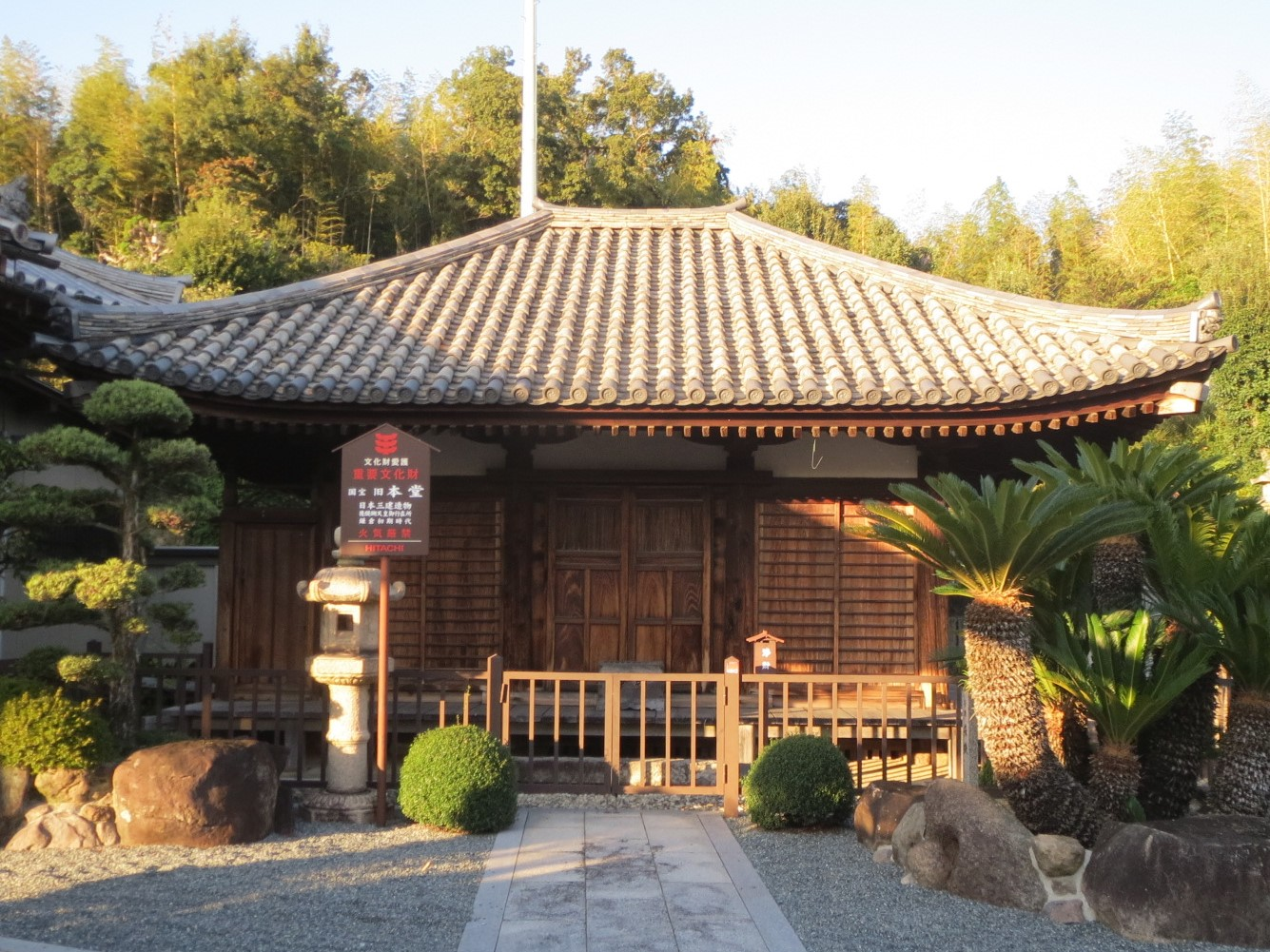 熊取町にある来迎寺旧本堂